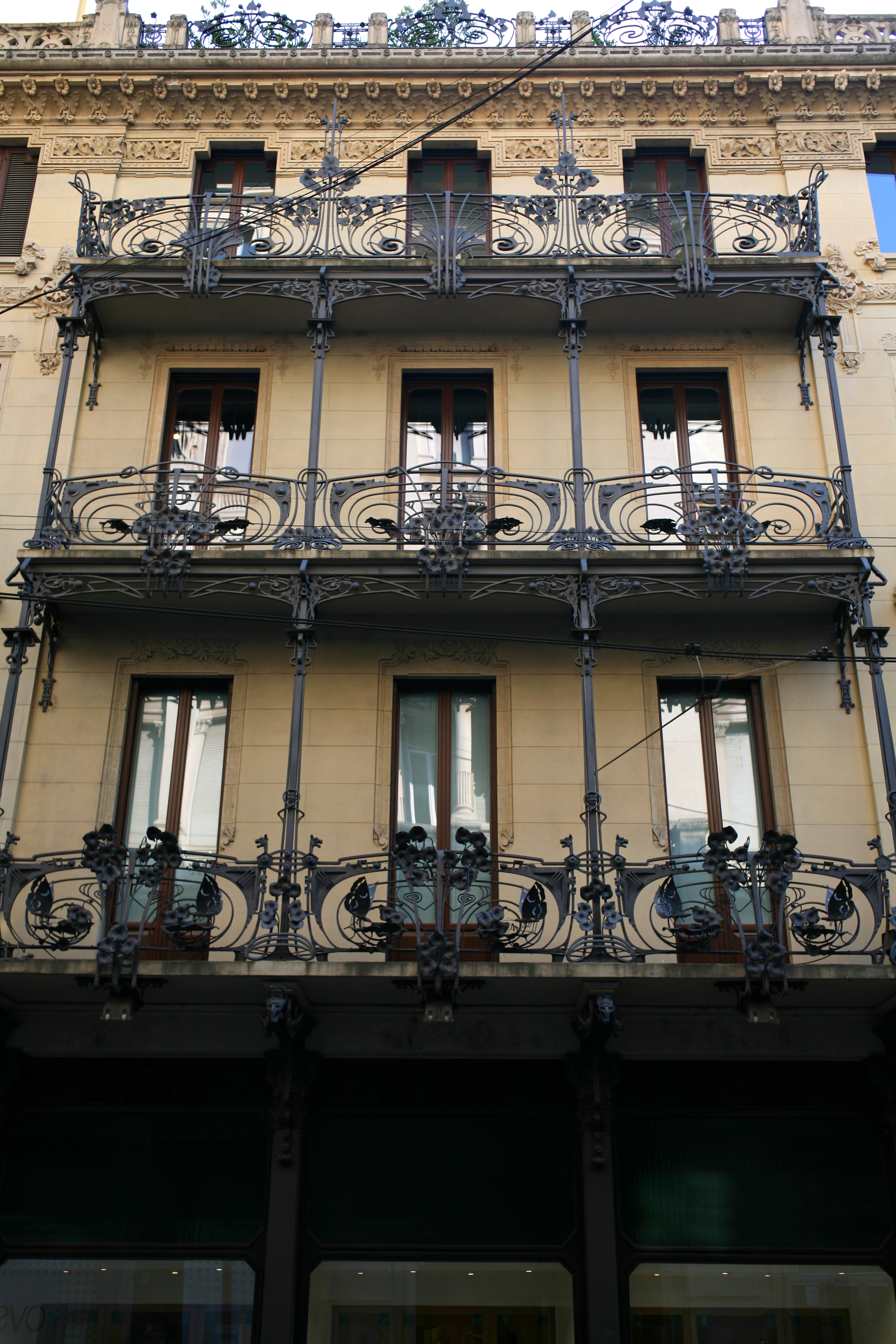 Casa Ferrario, Milano: veduta prospettica della facciata